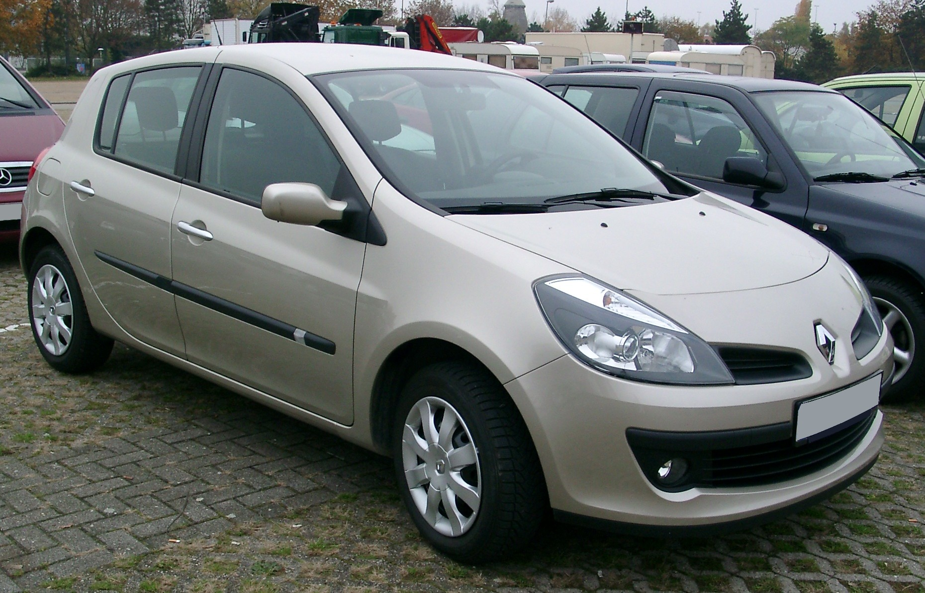 Renault Clio